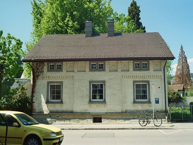 Ehemaliges Zollhaus in der Olgastraße 5 in Freidrichshafen. Erbaut: 1856.